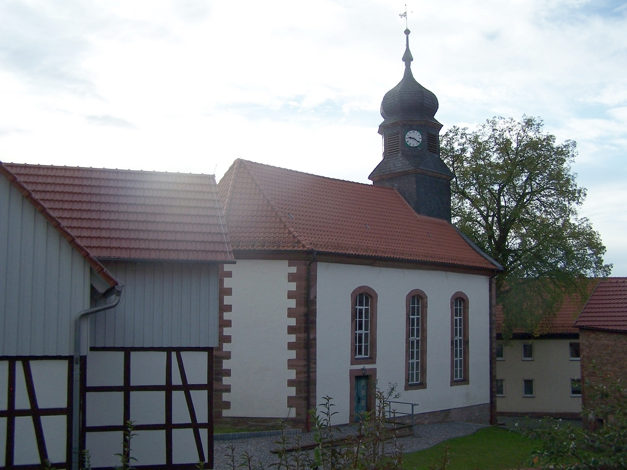 Teilansicht der Kirche im Gegenlicht.